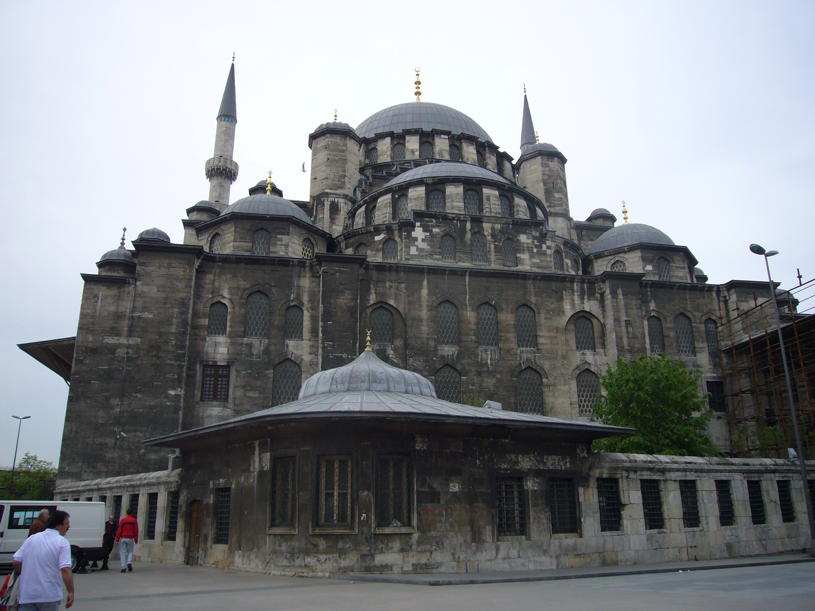 Istanbul, Fatih Camii